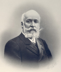 Monsieur Octave Homberg, père